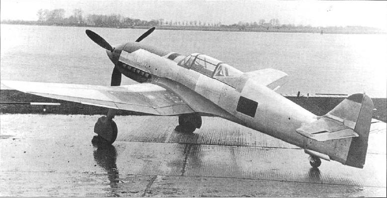 He 100 V1 на аэродроме Росток-Мариенех